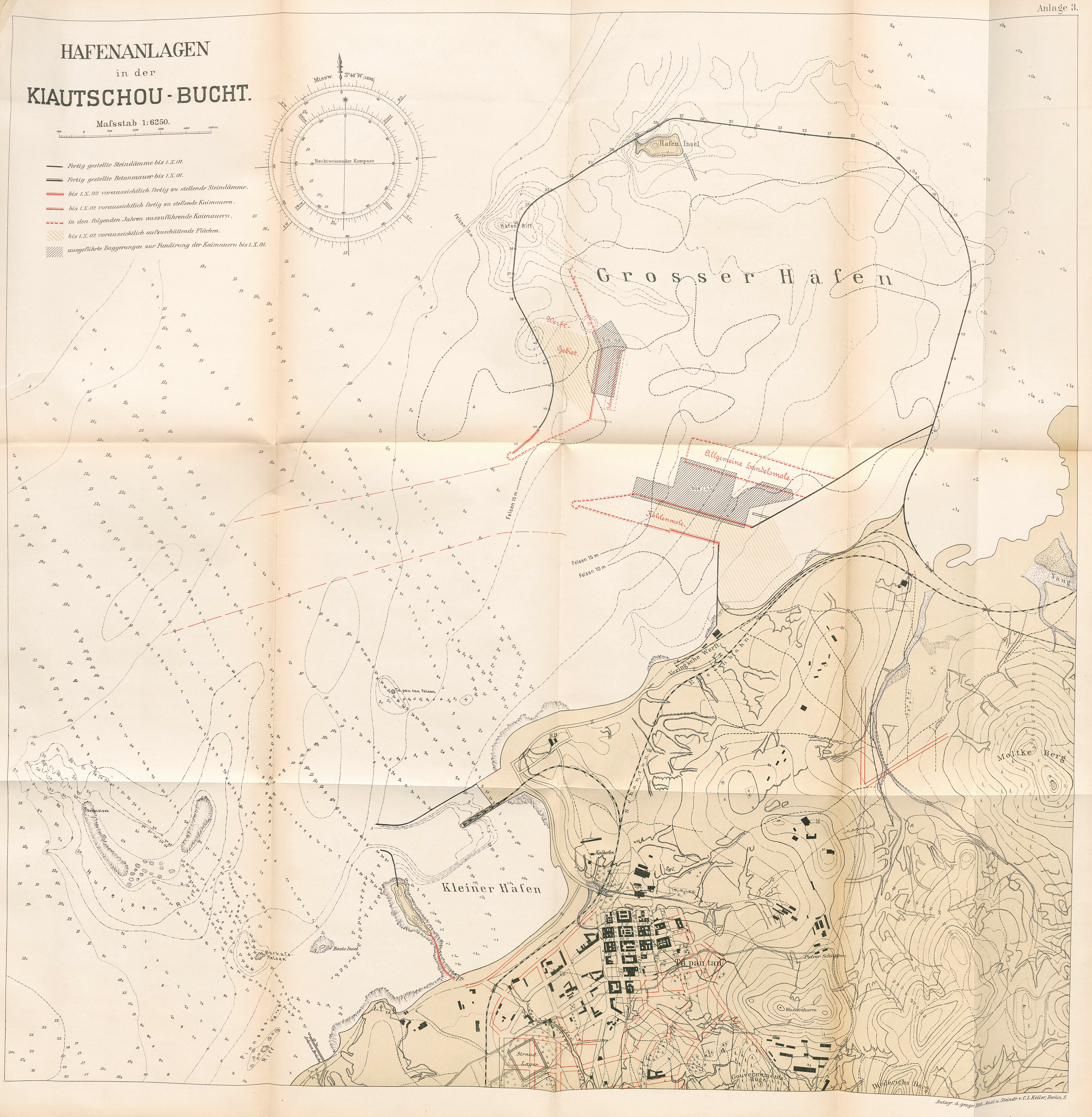 Hafenanlage in der Kiautschou-Bucht